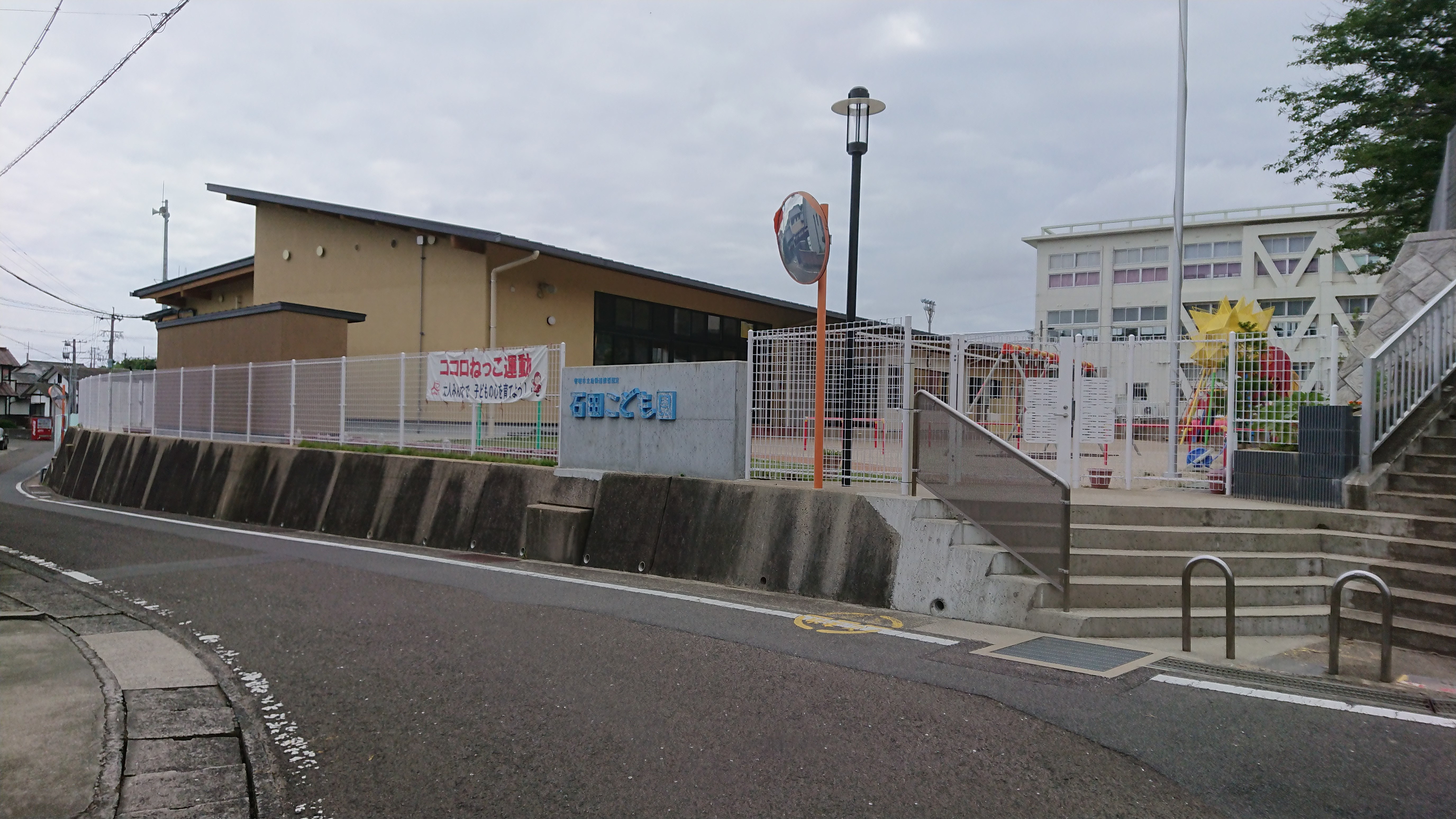 2019年（平成31年）4月1日に長崎県壱岐市石田町に開園したこども園。壱岐市立石田幼稚園と壱岐市立石田保育所が統合して開園。